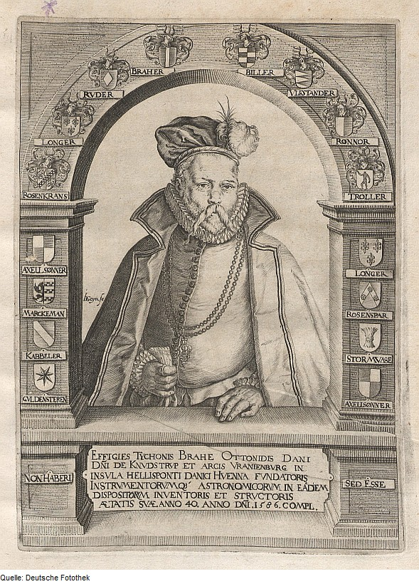 Original image description from the Deutsche Fotothek Porträt & Astronomie & Forschung